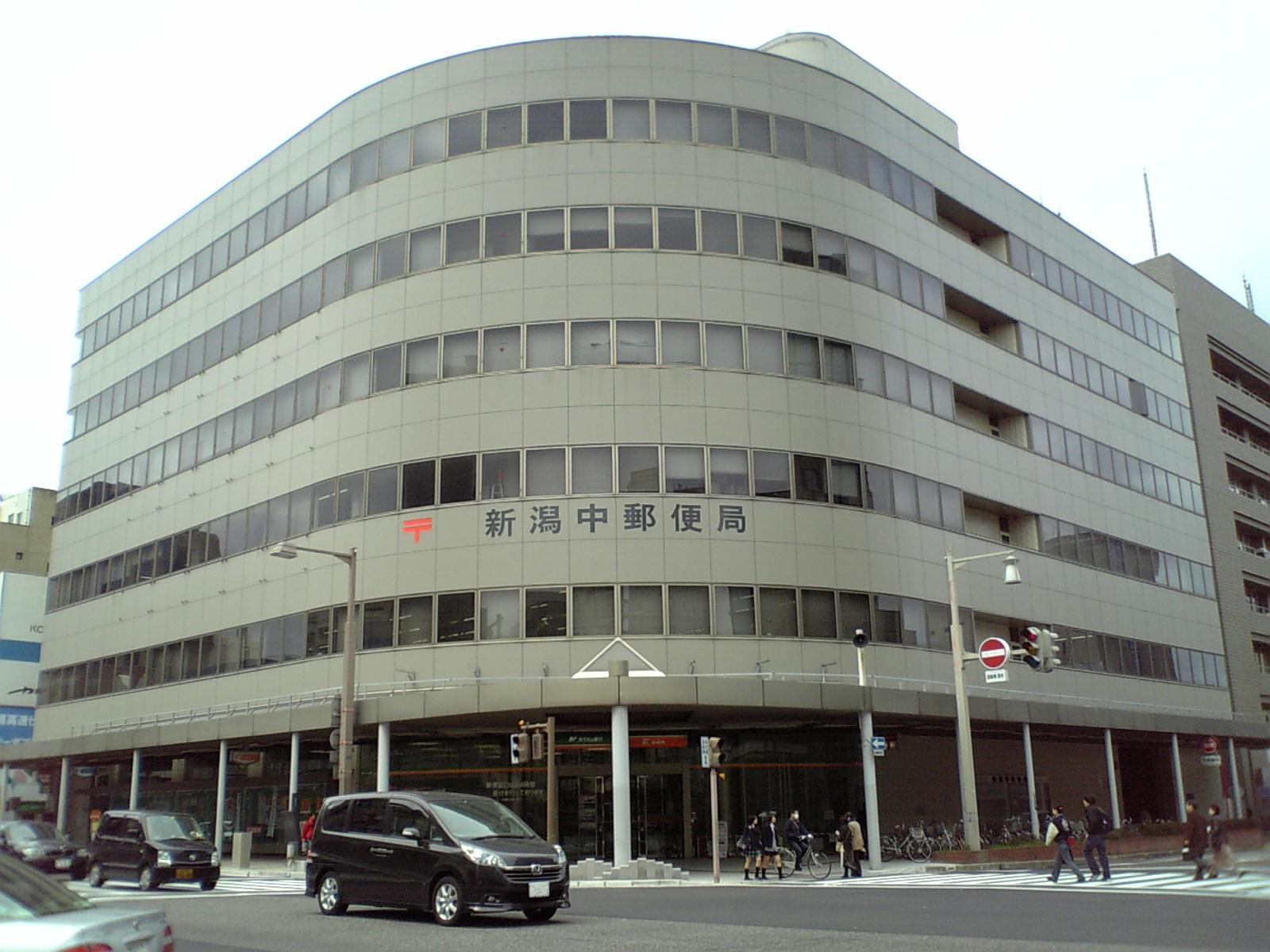 新潟中郵便局。